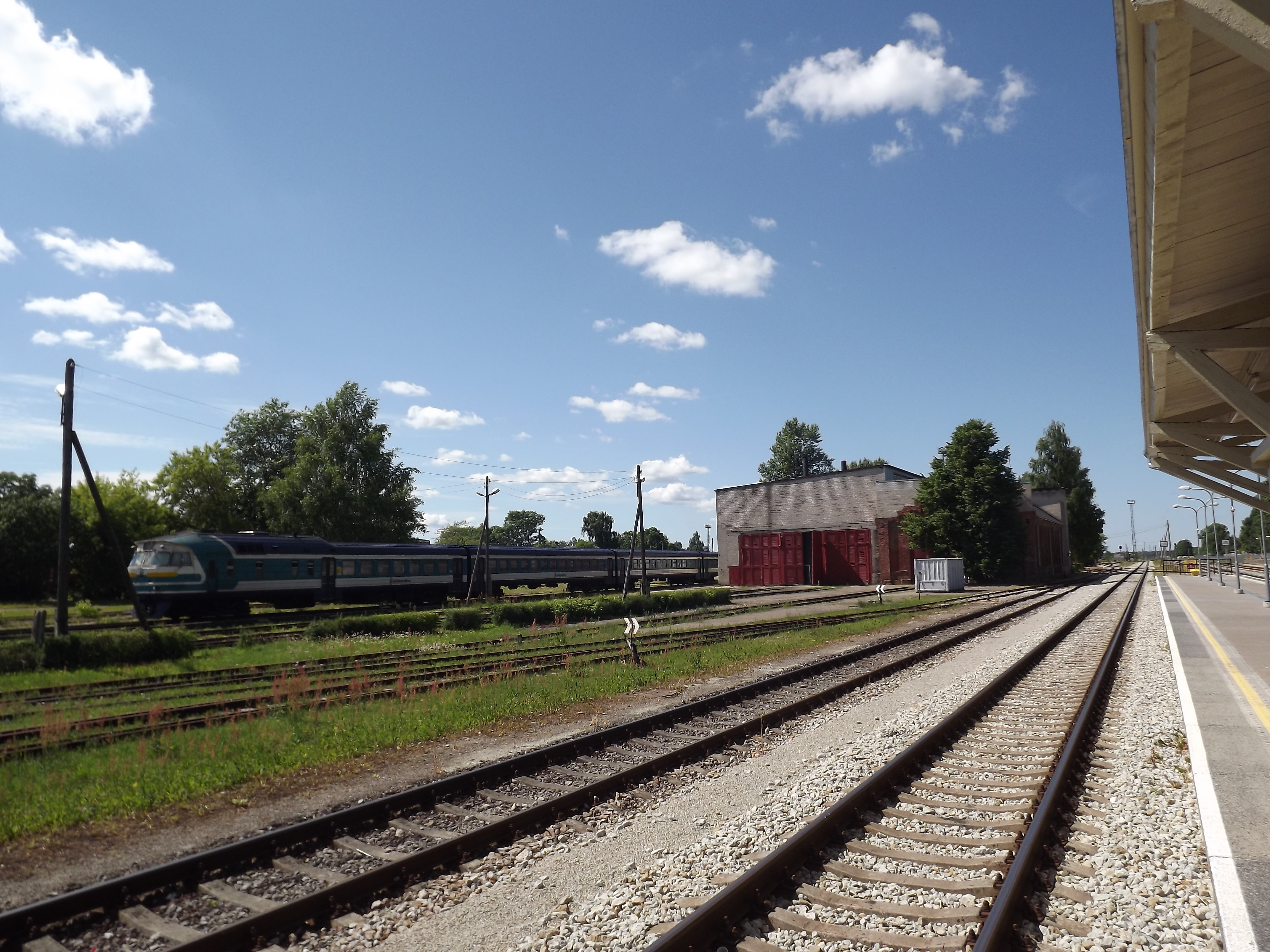 Depoo